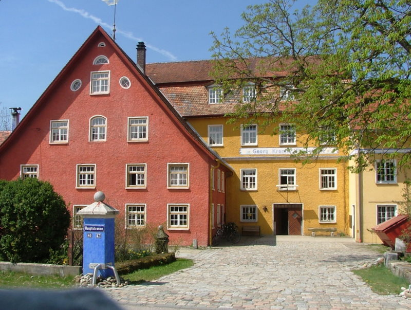 Aichstetten